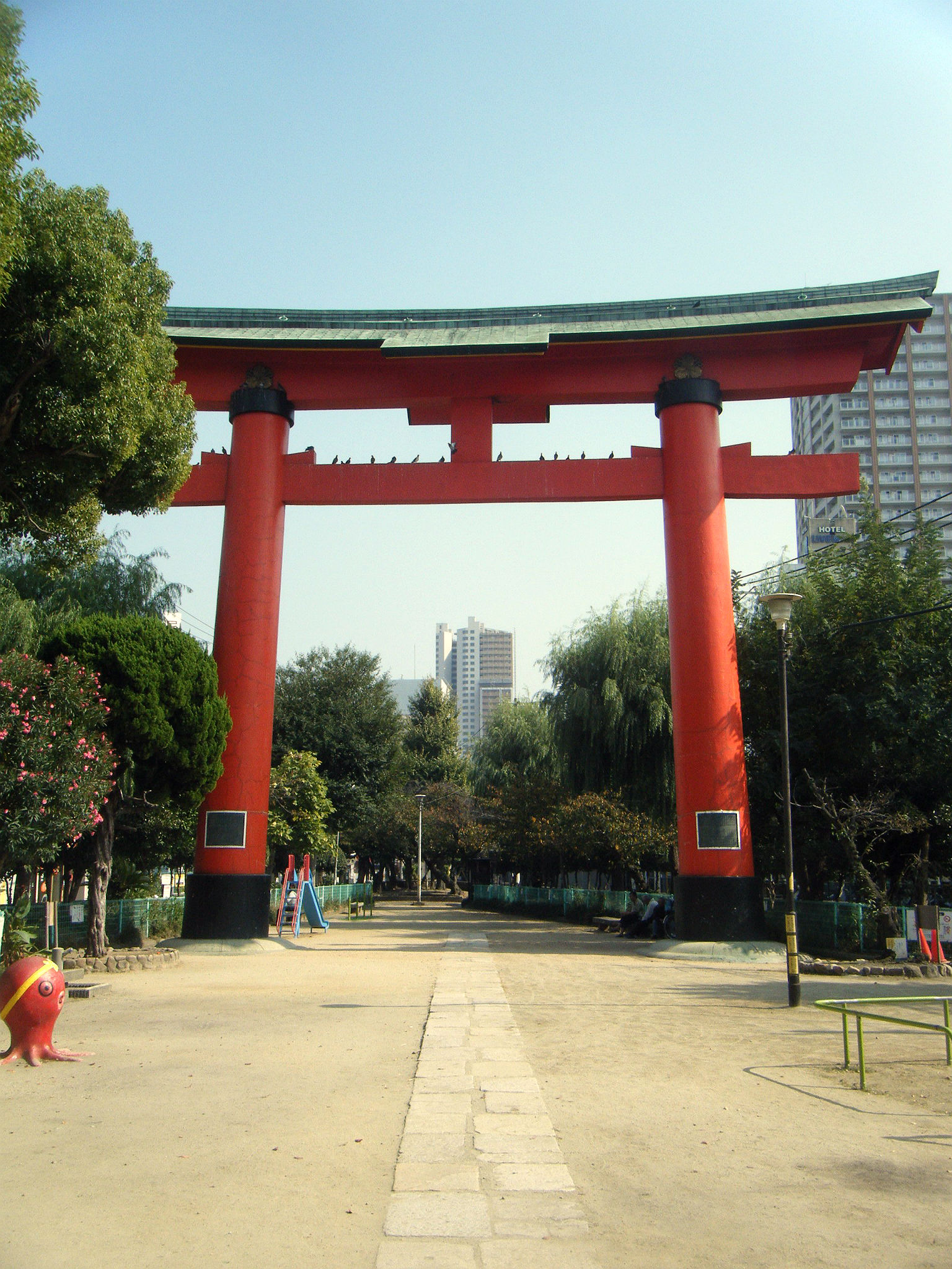 尼崎戎神社 大鳥居